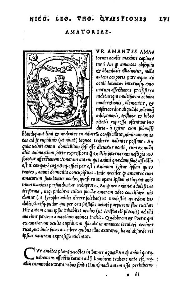 Nicolai Leonici Thomaei Opuscula nuper in lucem aedita [sic] quorum nomina proxima habentur pagella. - [Ex Venetiis : s. n., s. d.] (... opusculum hoc ex impressione repraesentauit Bernardinus Vitalis Venetus, 1525 die xxiii Februarii). - CXXXIX, [5] c. : ill. ; 4º. - Contiene testi di Aristotele, Platone e Proclo .